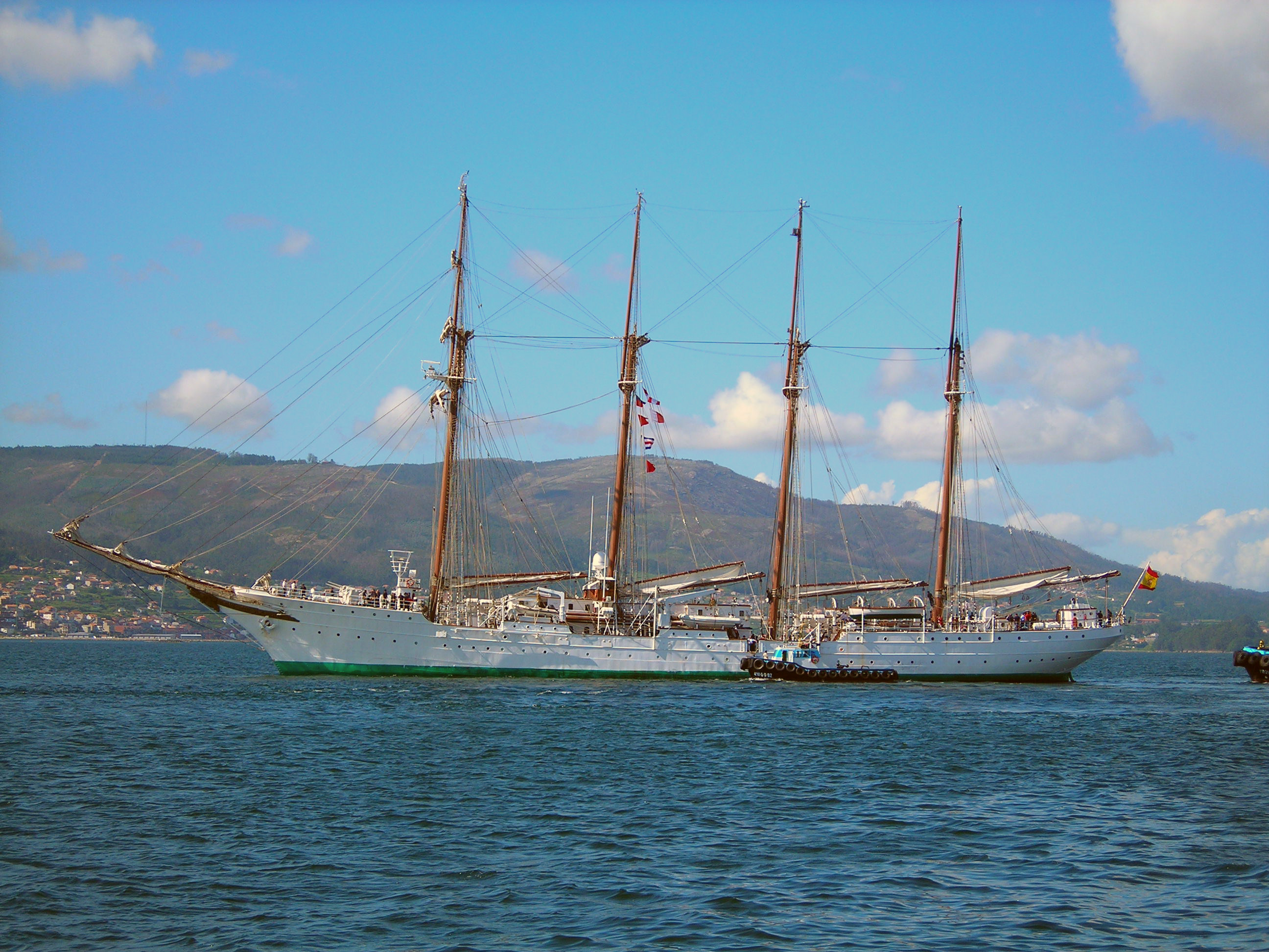 O Juan Sebastián Elcano, buque escola da Armada española, na ría de Pontevedra (Galiza)